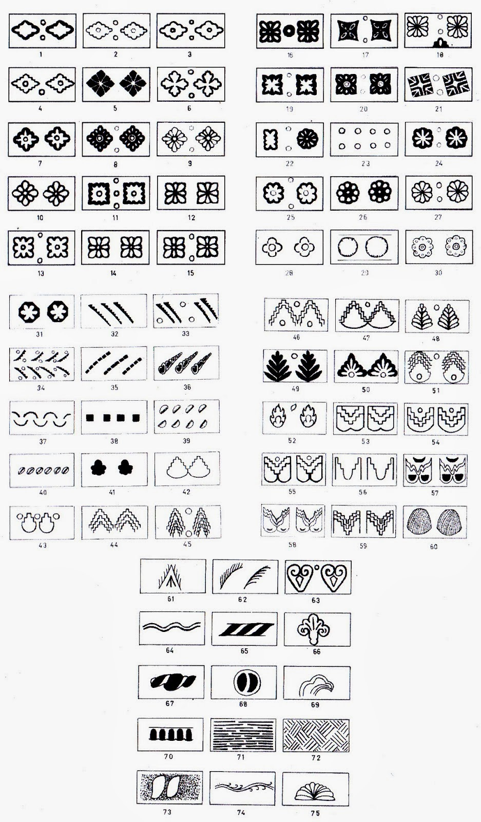 75 ragam hias khas Banten yang direkonstruksi oleh arkeolog nasional dari benda-benda purbakala peninggalan Kesultanan Banten.